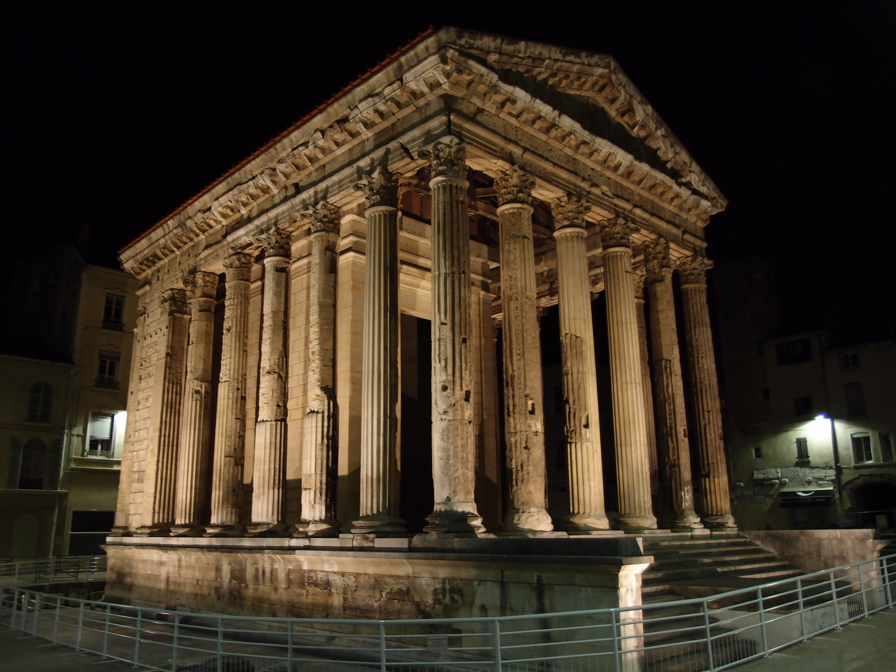 Teilansicht des römischen Tempels in Vienne (Isère) bei Nacht Datum: 21.09.2012 Urheber: M. Pfeiffer alias Benutzer:Gordito1869 Quelle: privates Fotoarchiv des Urhebers